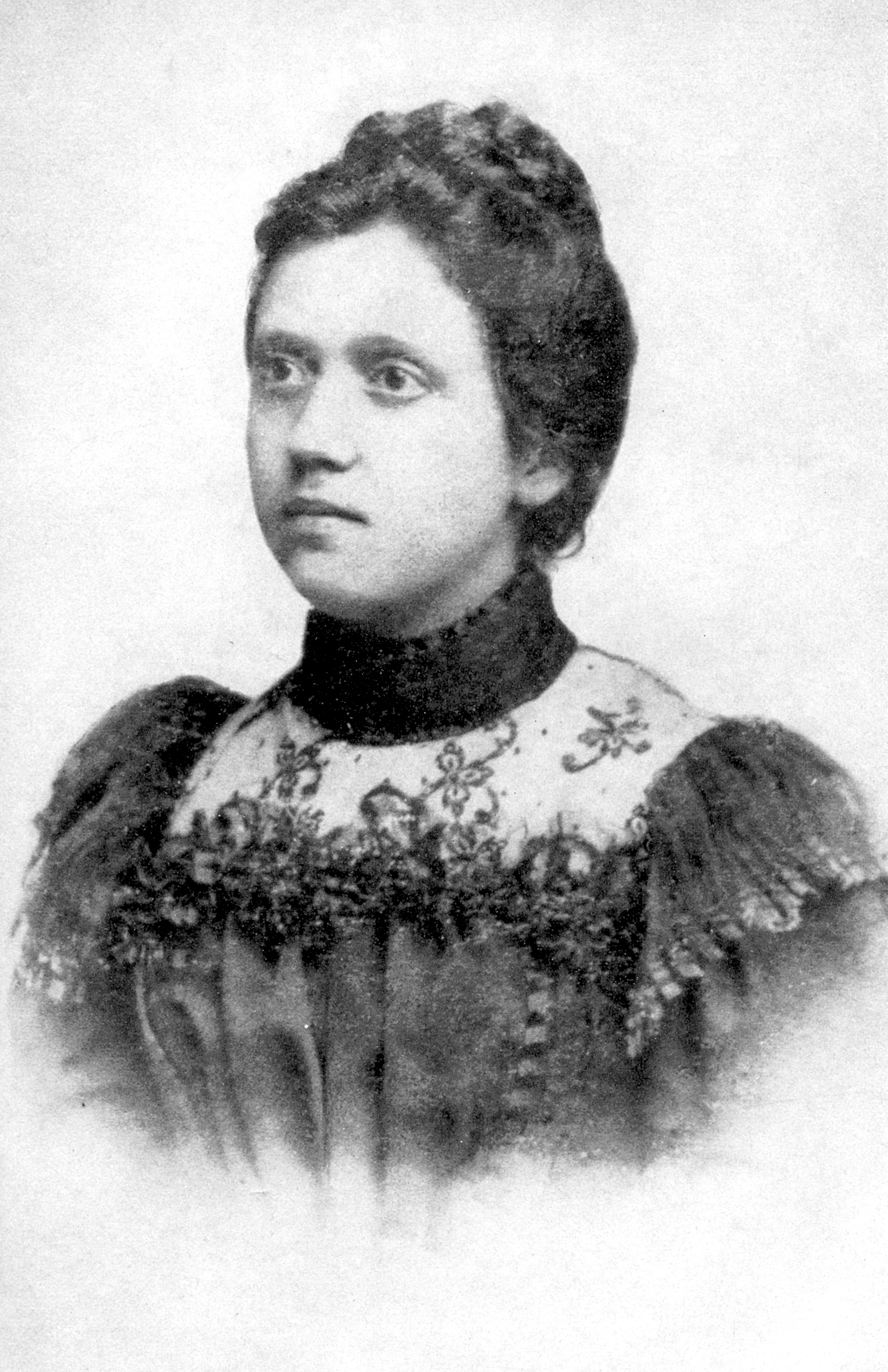 Янка Каневчева от Охрид, любима на Гоце Делчев, а по-късно на Михаил Герджиков